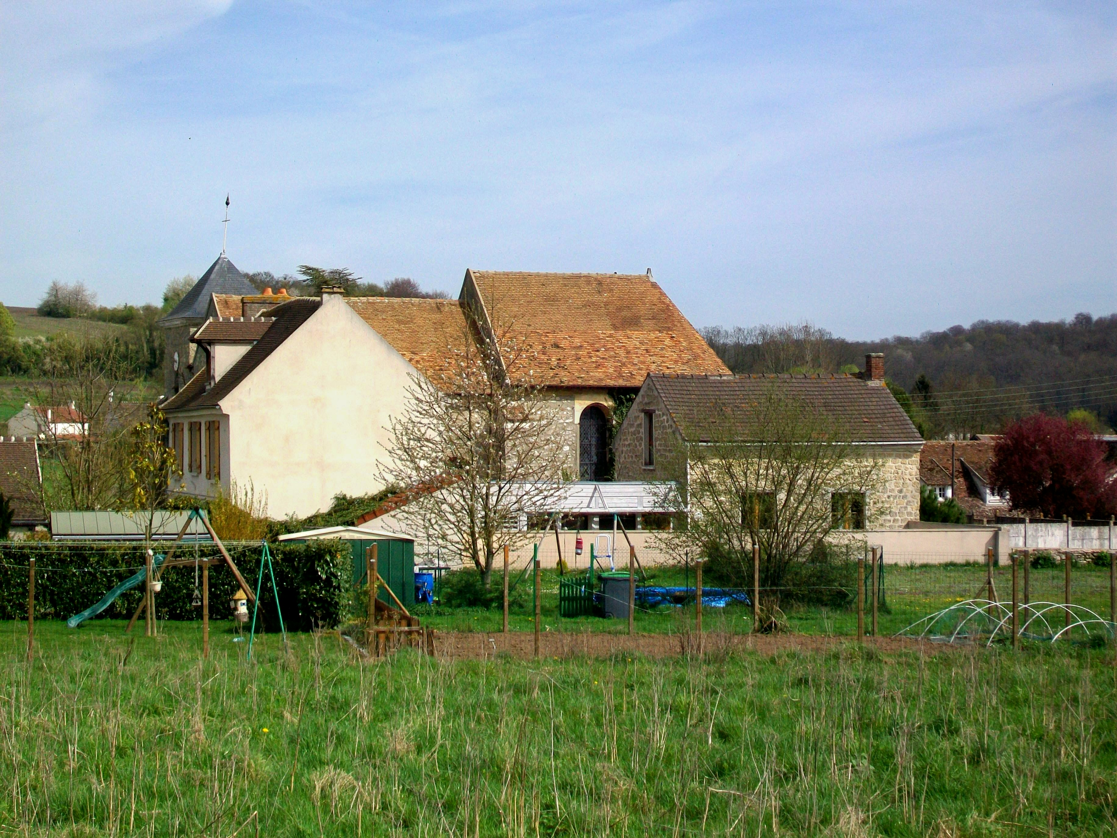 La mairie (ancien presbytère), l'église Notre-Dame-de-la-Nativité et l'ancienne école à classe unique de 1880 (aujourd'hui salle des fêtes), de gauche à droite.